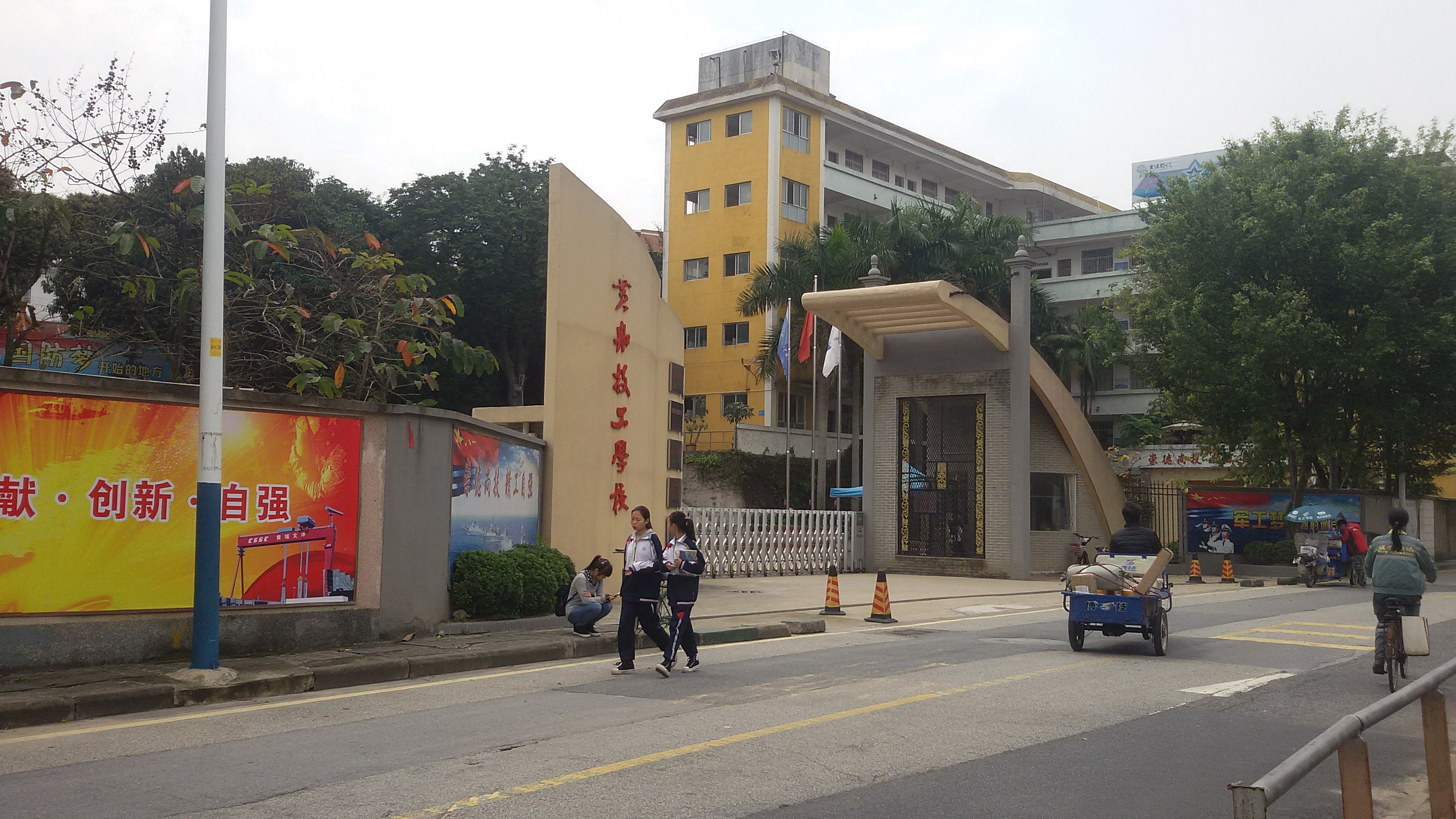 粵語: 黃埔造船廠技工學校嘅正門